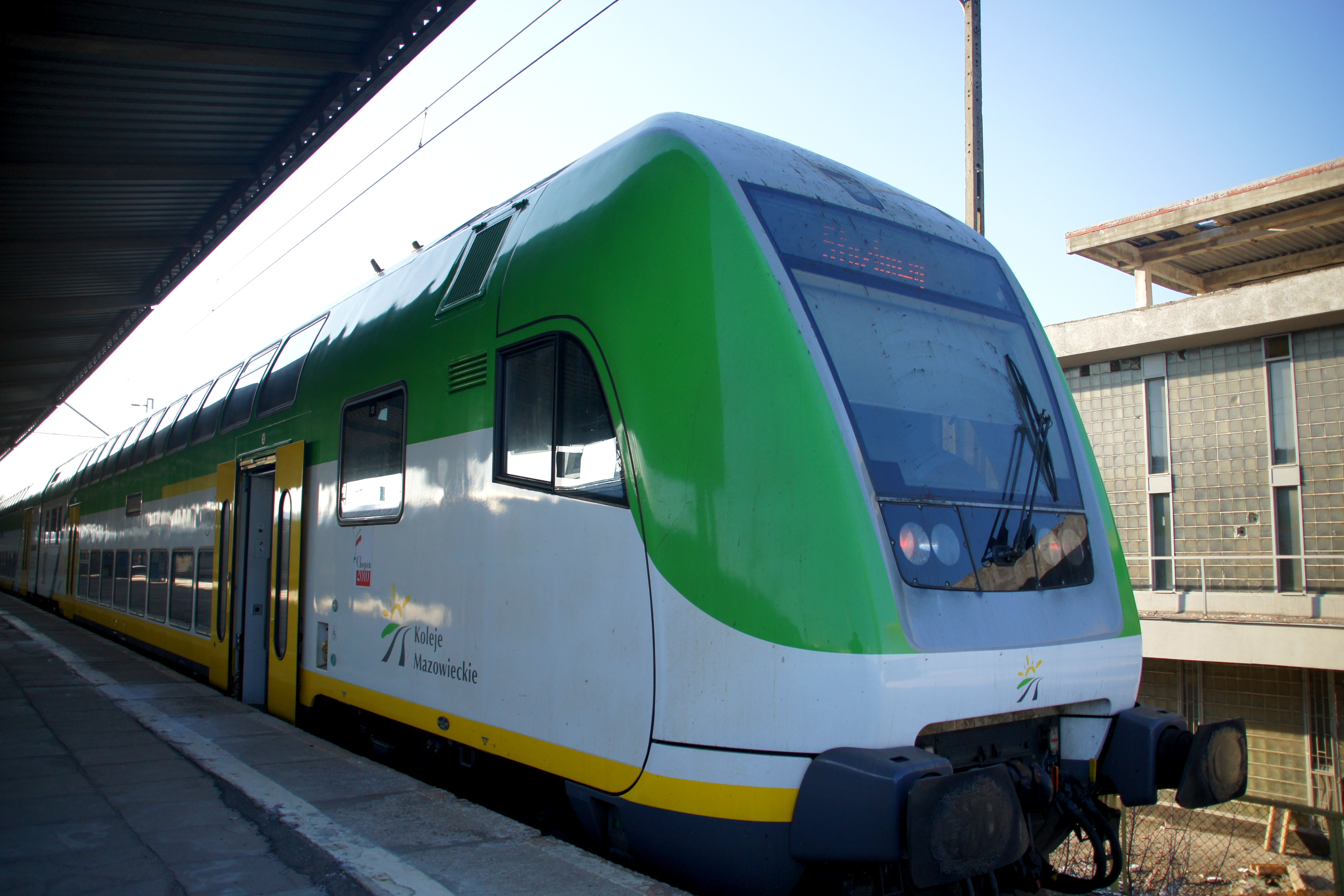 Wagony piętrowe push-pull produkcji "Bombardier" na stacji Warszawa Wschodnia